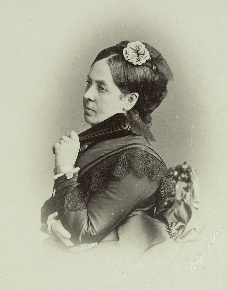 Графиня Александра Андреевна Толстая (1817 — 1904)